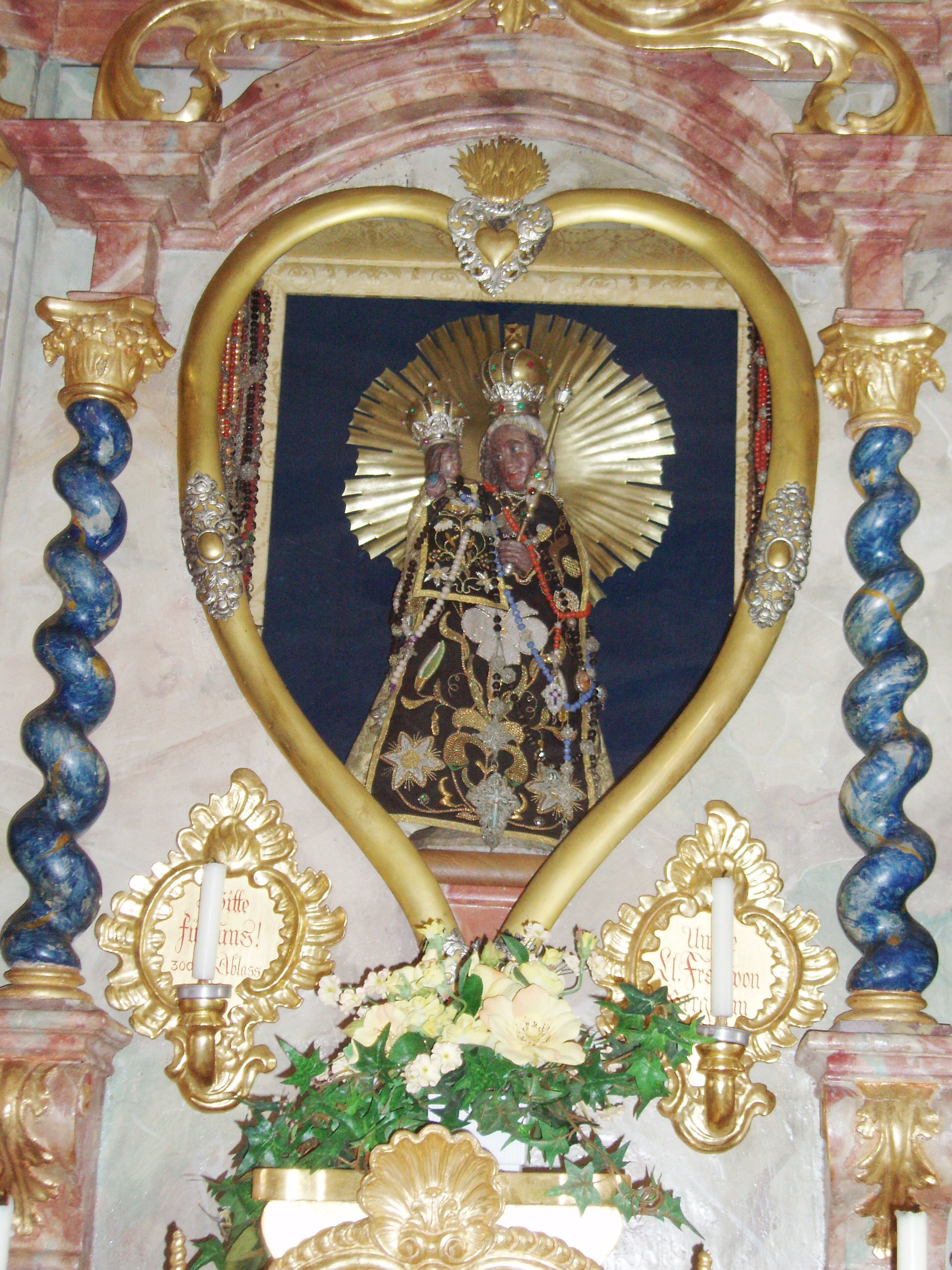 Altöttinger Madonna in der Marienkapelle von Bergheim, Landkreis Neuburg-Schrobenhausen